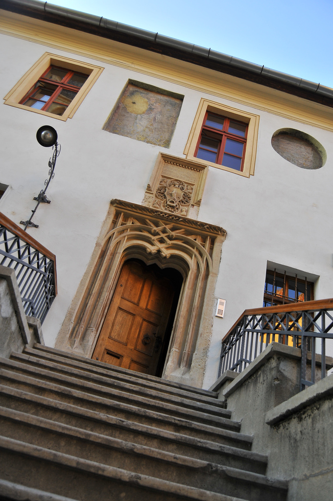 Piata Huet nr : 1